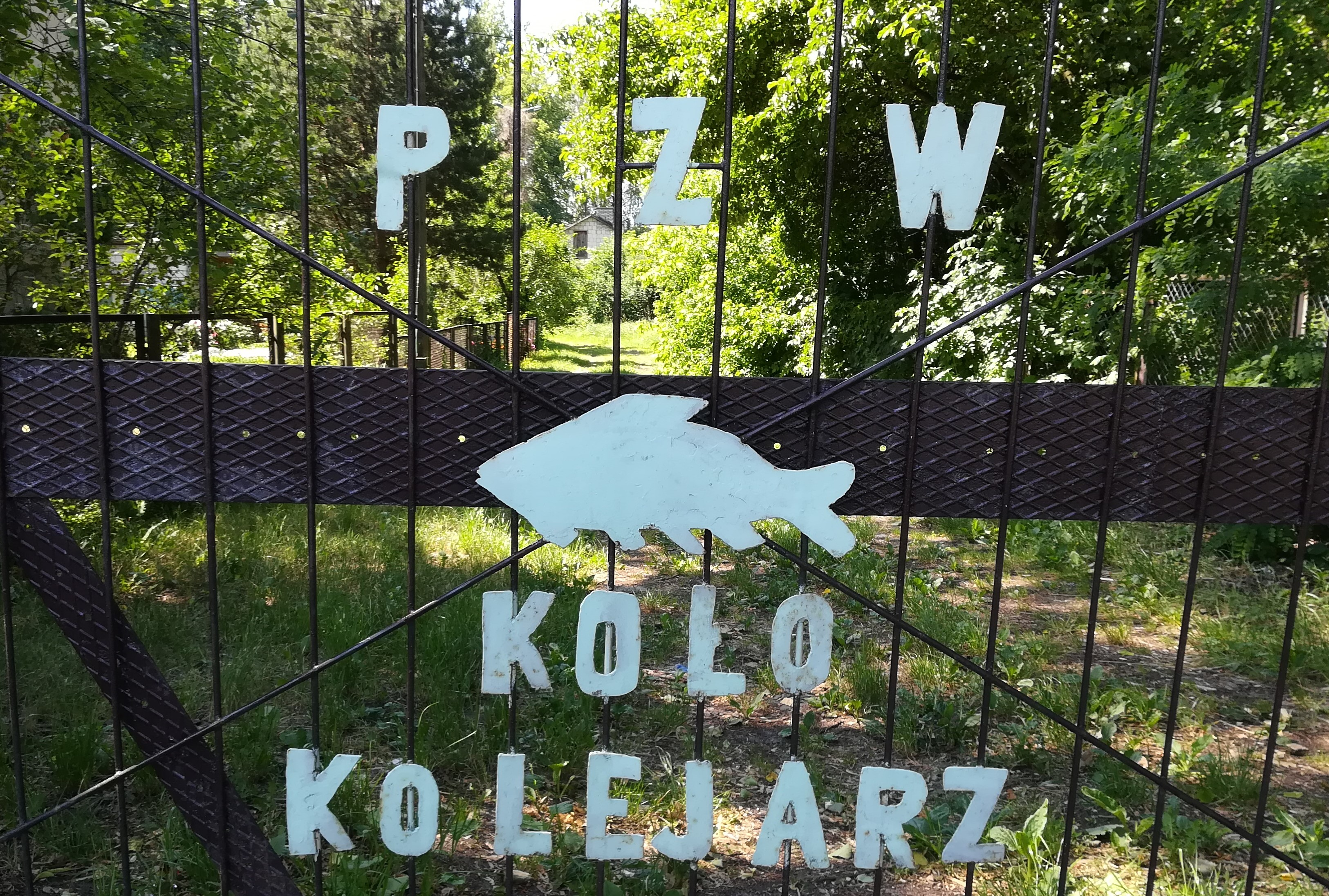 Koło PZW w Łukowie.